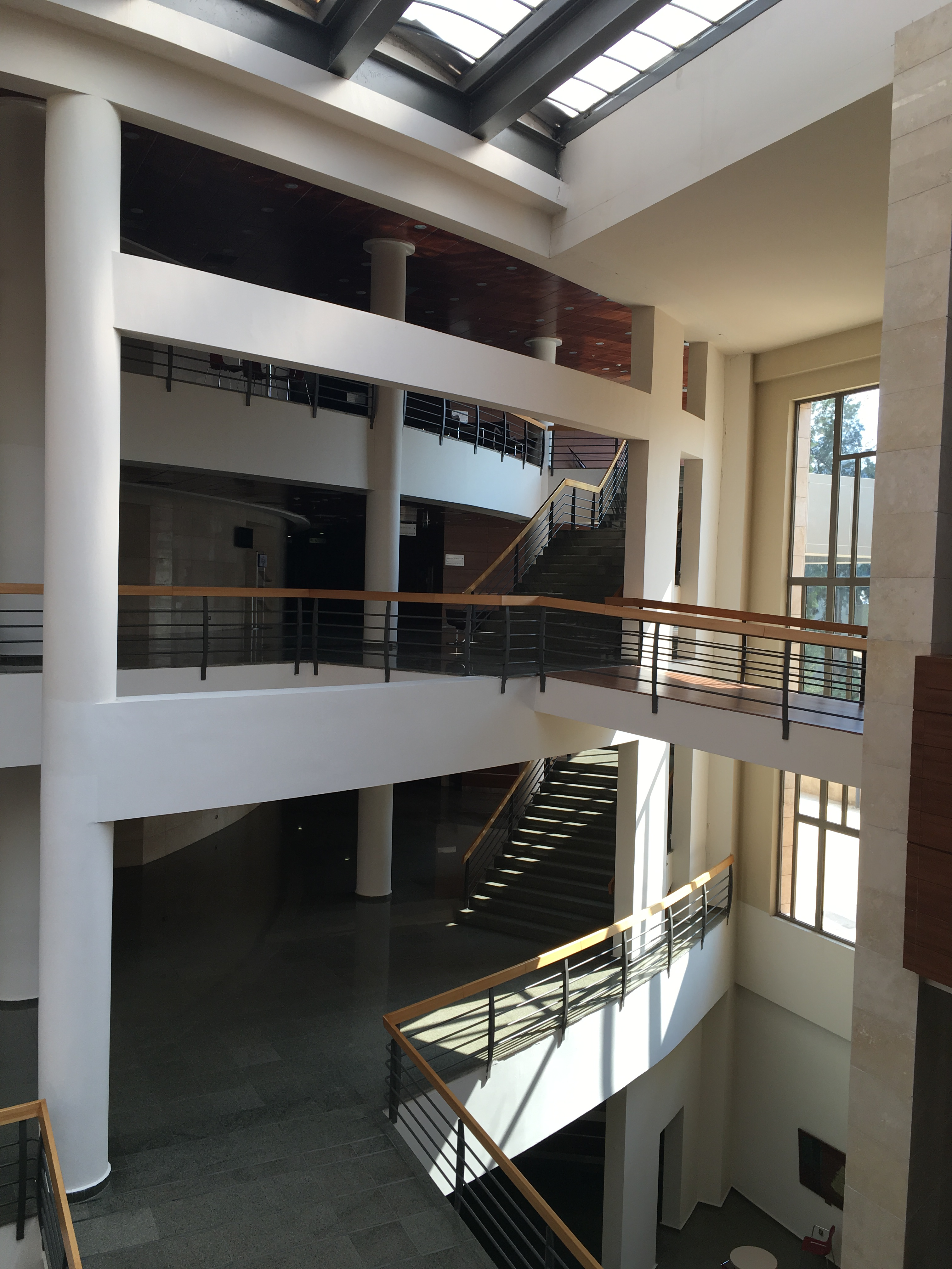 Glass windows and roof can be seen. Also the circulation elements.